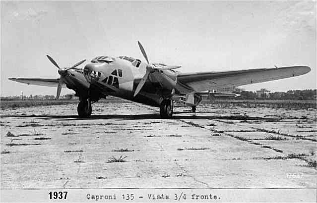 Aeroplano CAPRONI 135 - da bombardamento - 2 MOTORI I.F. ASSO XI Rc